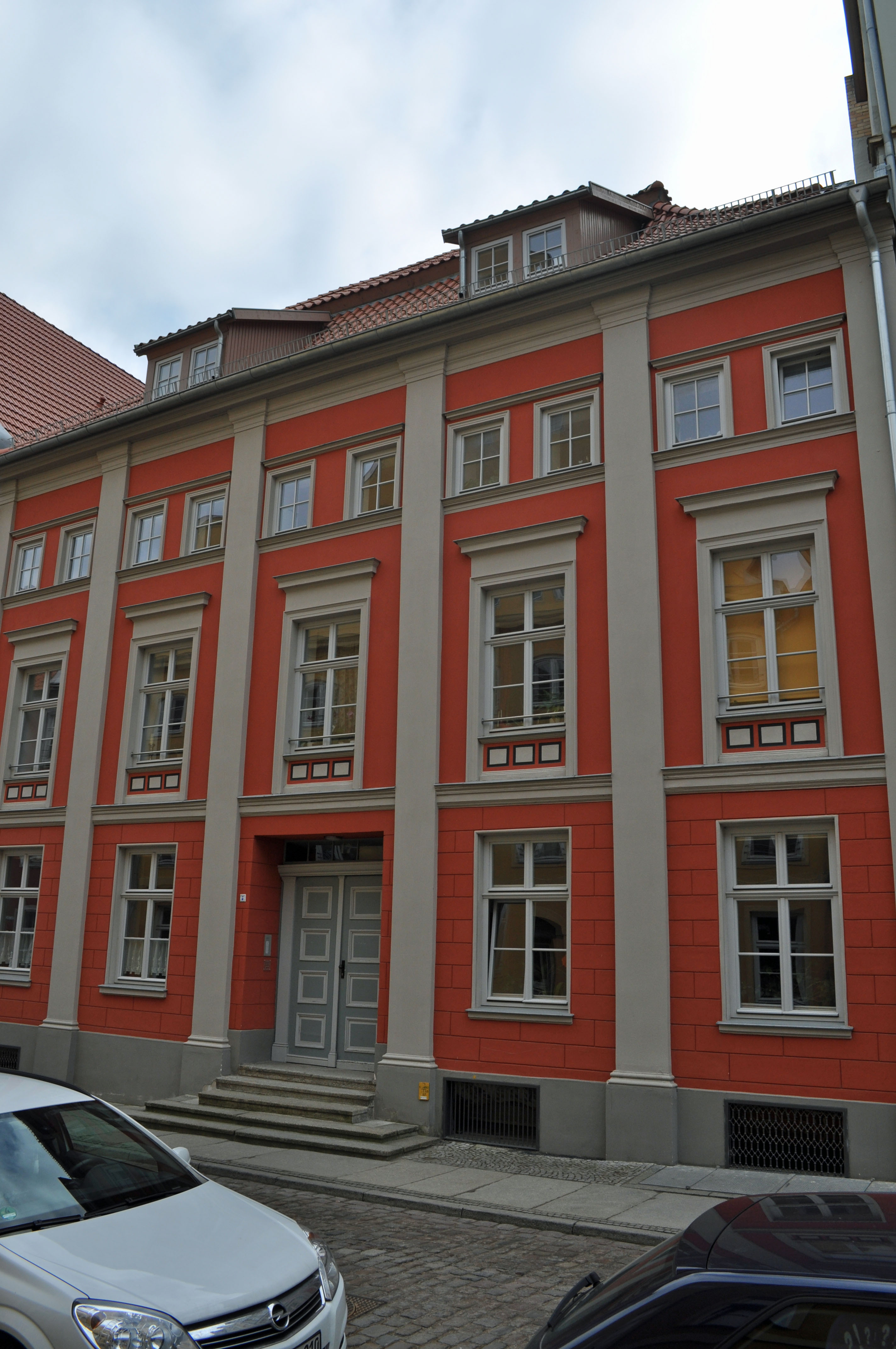 Gebäude bzw. Gebäudedetail in Stralsund. Straße und Hausnummer siehe Dateiname.